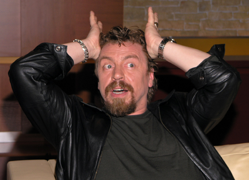 Schauspieler Armin Rohde (C) Edmond Frederik